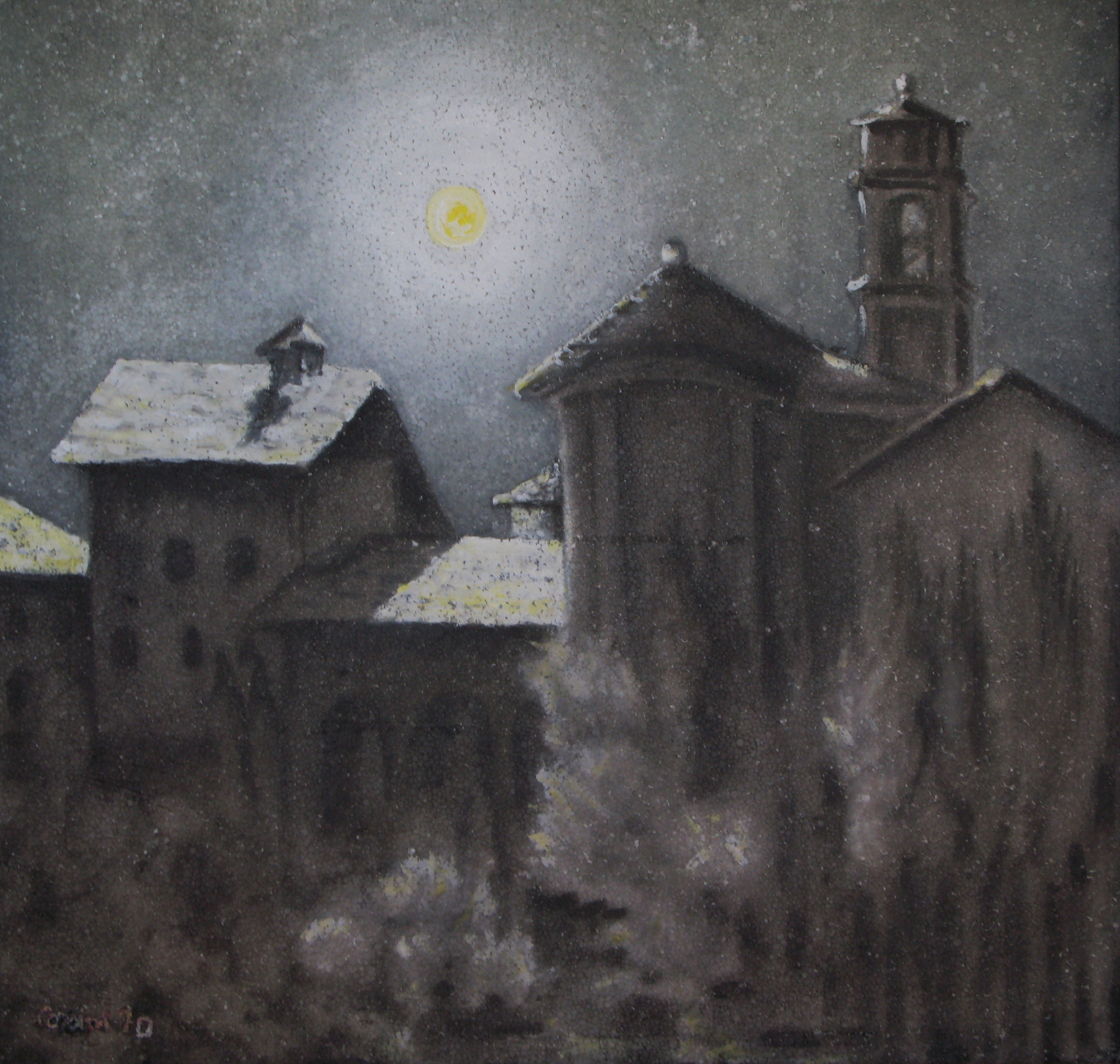 Eugenio Corsini, dipinto acrilico, notturno, San Benedetto Belbo